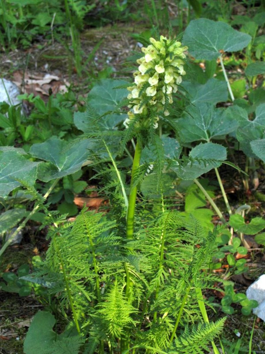 Bosenski ušivec na Ljubelju.